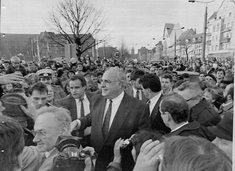 Erfurt, Helmut Kohl im Wahlkampf ADN/ZB/Hirndorf-Tele/20.2.90 Erfurt: Wahlkampf Zu seinem ersten Auftritt im Volkskammerwahlkampf erschien BRD-Bundeskanzler Helmut Kohl auf dem historischen Erfurter Domplatz. Die Kundgebung in der Bezirksstadt war die erste von insgesamt sechs Veranstaltungen, auf denen der CDU-Vorsitzende für die "Allianz für Deutschland" werben will. Abgebildete Personen: Kohl, Helmut: Bundeskanzler, Ministerpräsident von Rheinland-Pfalz, CDU, Bundesrepublik Deutschland (GND 118564595)